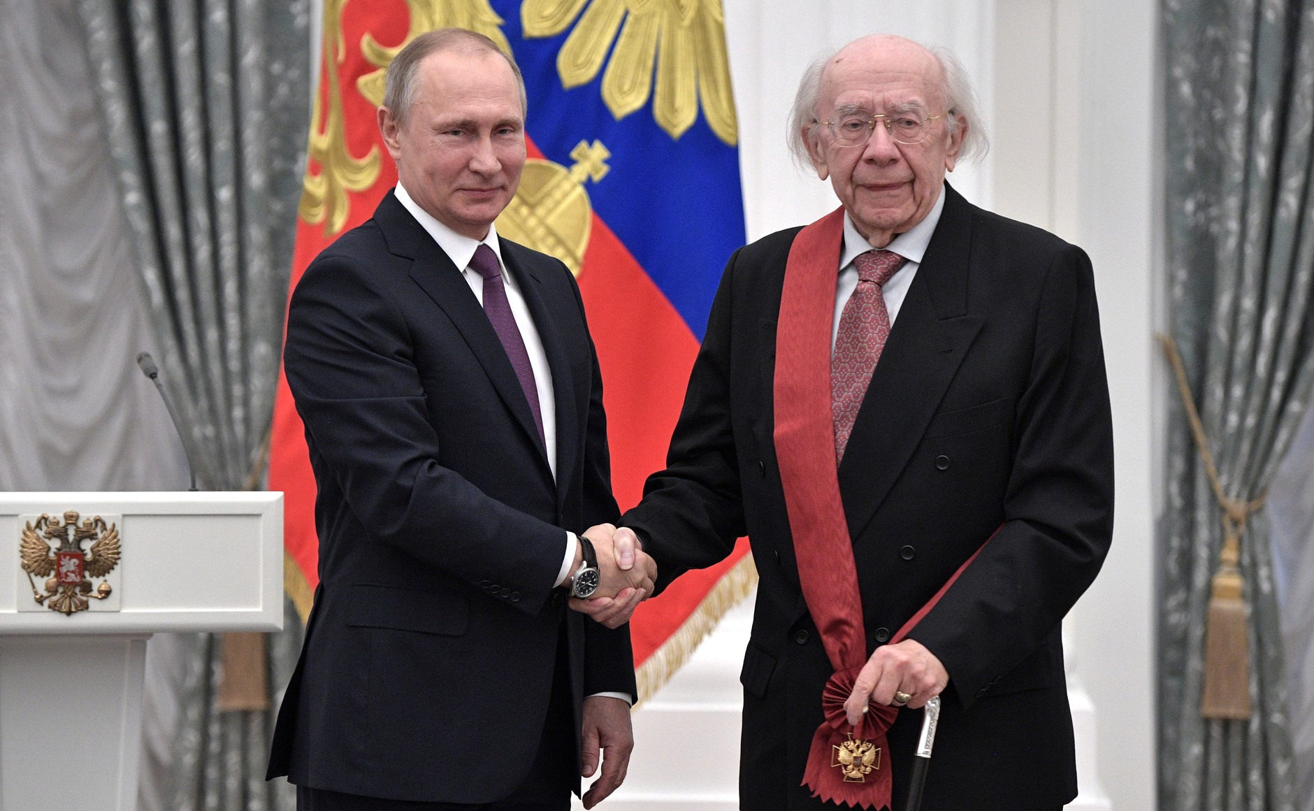 На церемонии вручения государственных наград. Орденом «За заслуги перед Отечеством» I степени награжден Геннадий Рождественский – профессор Московской государственной консерватории имени П.И.Чайковского